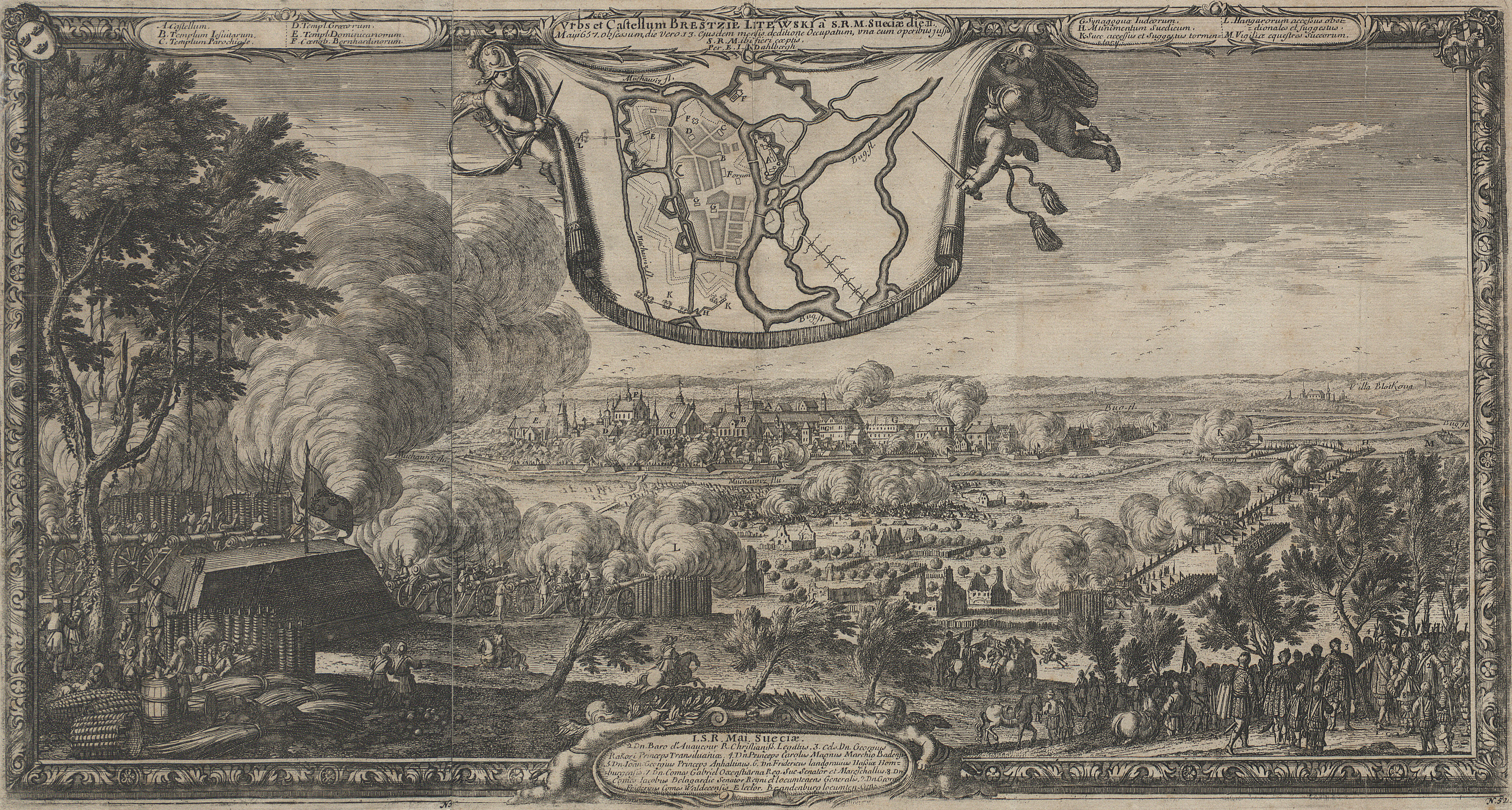 Беларуская (тарашкевіца): Берасьце Літоўскае (Bieraście Litoŭskaje). Аблога места ў вайну Швэцыі з Рэччу Паспалітай, 1657Latina: Urbs et Castellum Brestzie Litewski // De rebus a Carolo Gustavo Sueciae rege gestis commentariorum libri VII, 1696